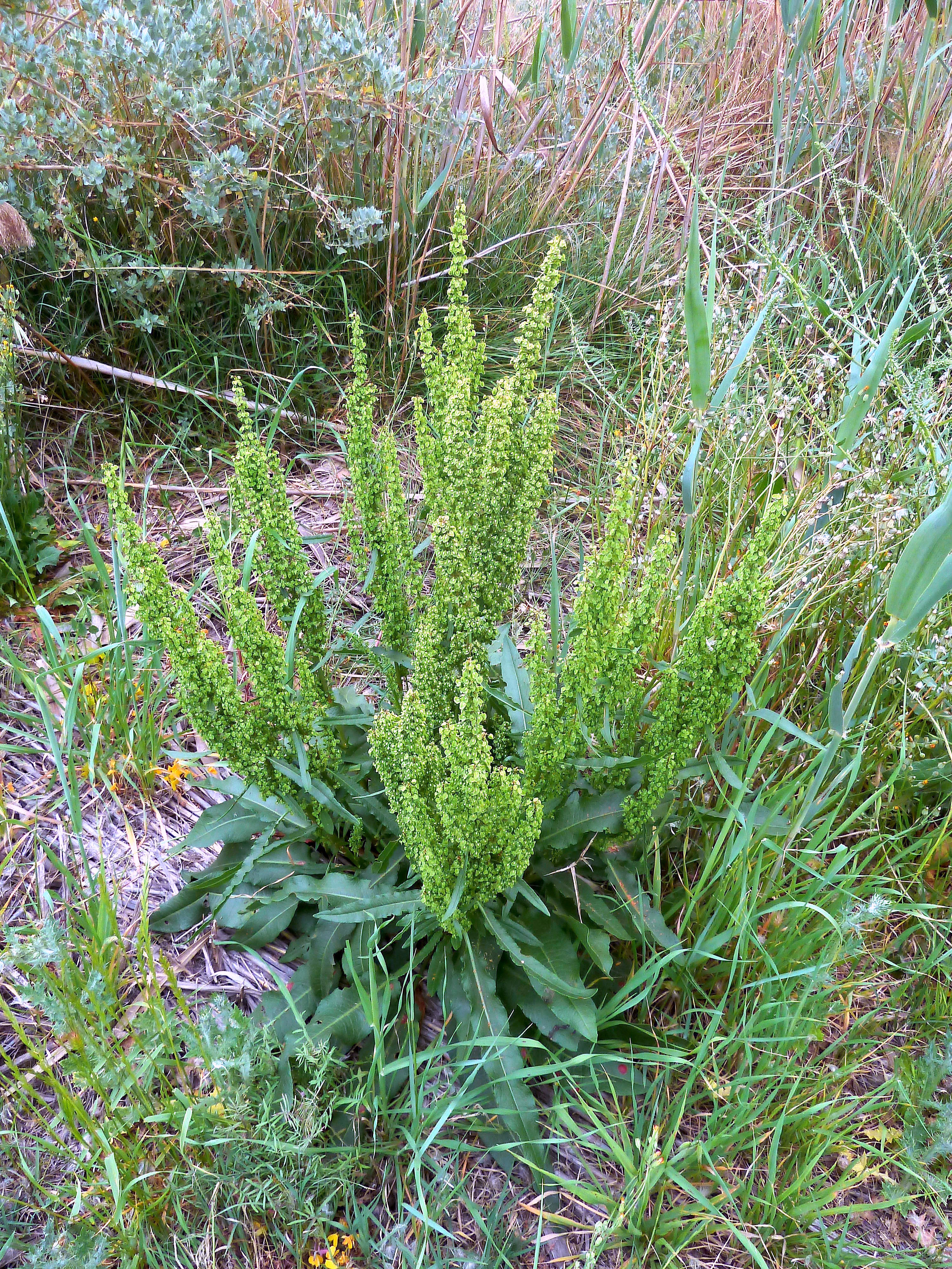 Rumex crispus (romaza, lengua de vaca, vinagrera, ...) - Vista general en fructificación. - Camino de la Azarbe de Patricio, Albatera, Provincia de Alicante (España).